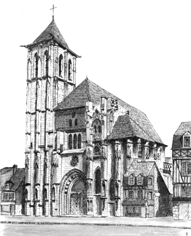 Église Saint-Ouen à Pont-Audemer Scan d'un dessin et lavis à l'encre de Chine Auteur : Utilisateur:Ratigan Licence GDFL utilisateur:Ratigan